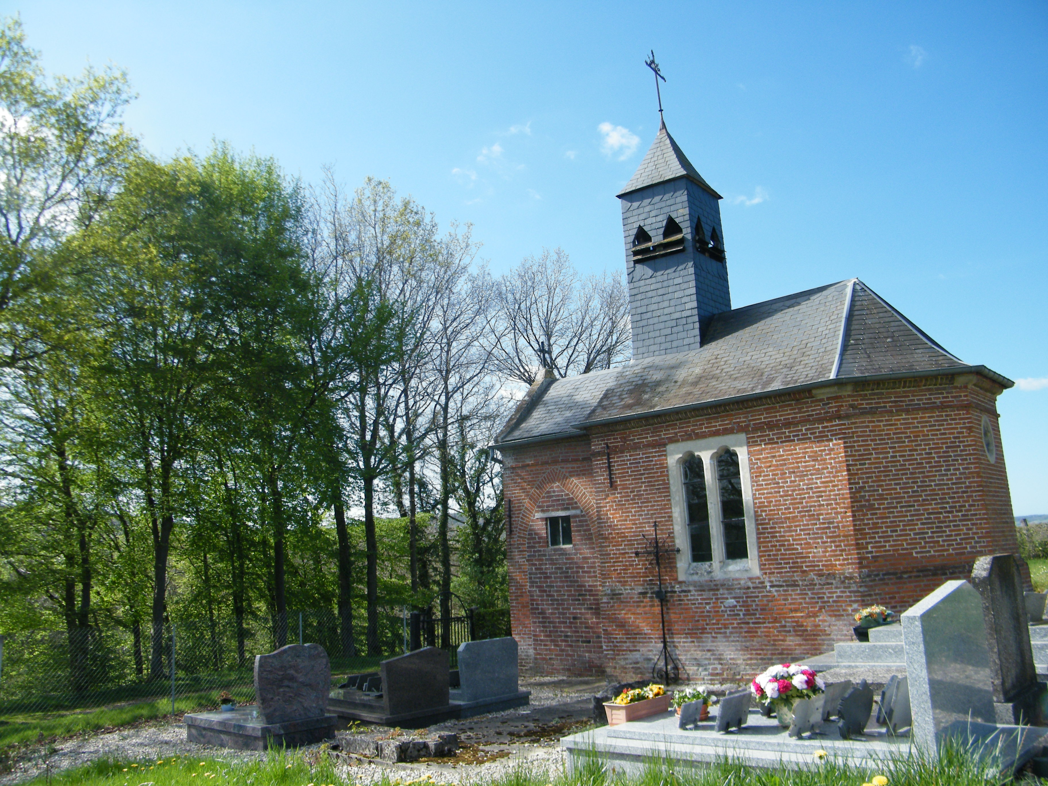 Chapelle.